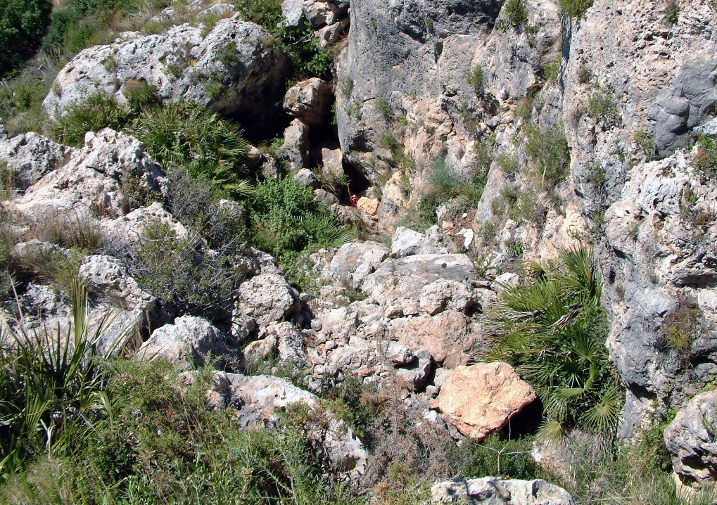 Zona de acceso a la Cueva